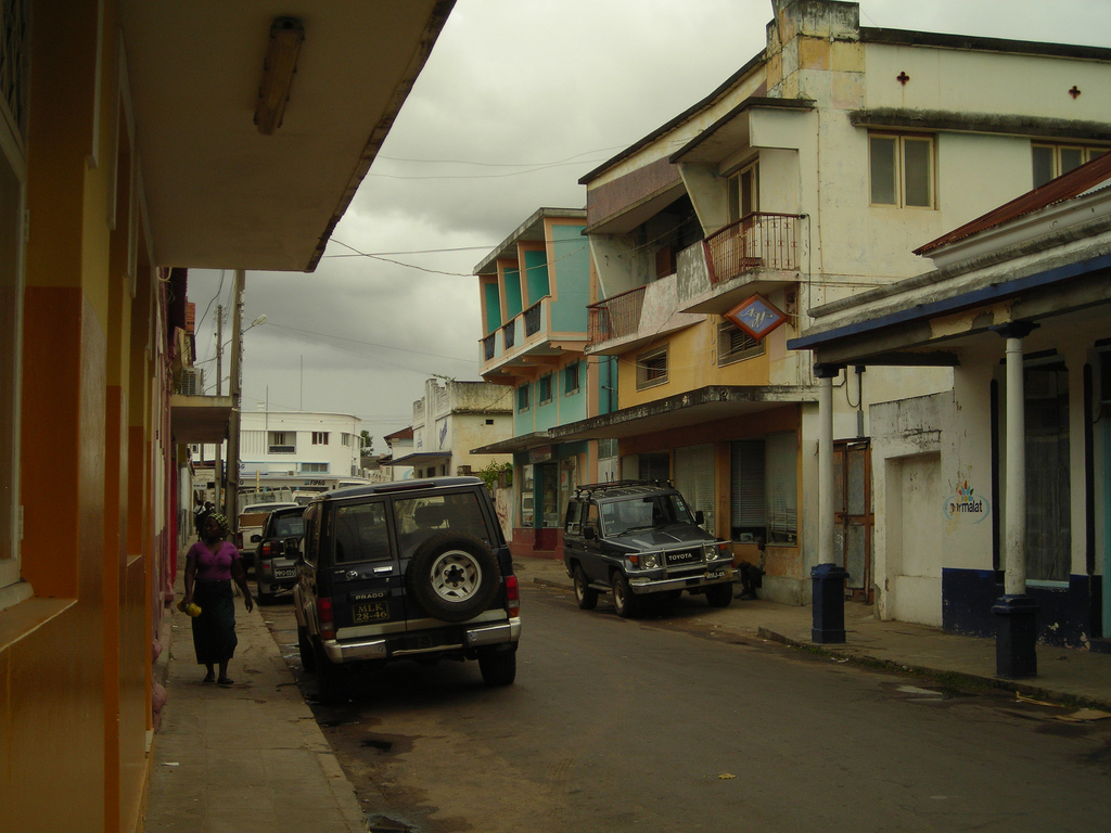 Inhambane